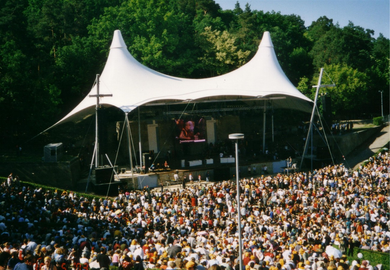 Der Dalai Lama auf dem Ökumenischen Kirchentag 2003 in der Berliner Waldbühne aufgenommen am: 30. Mai 2003